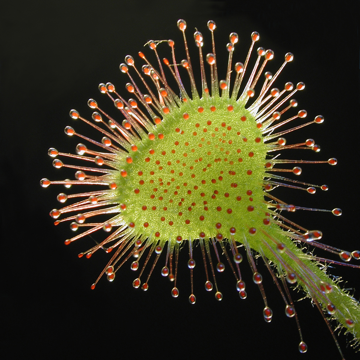 Rosnatka okrouhlolistá